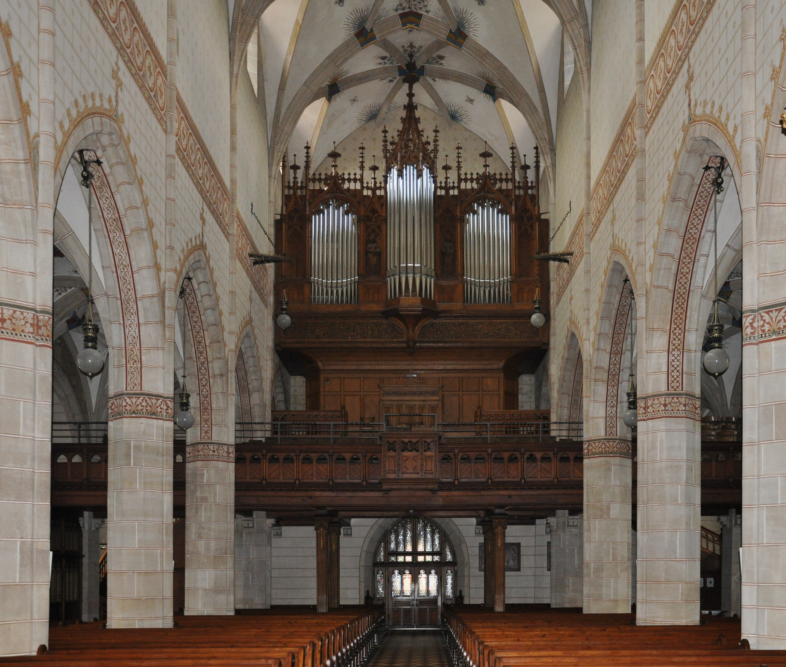 Bad Urach, Stiftskirche St. Amandus, Orgel